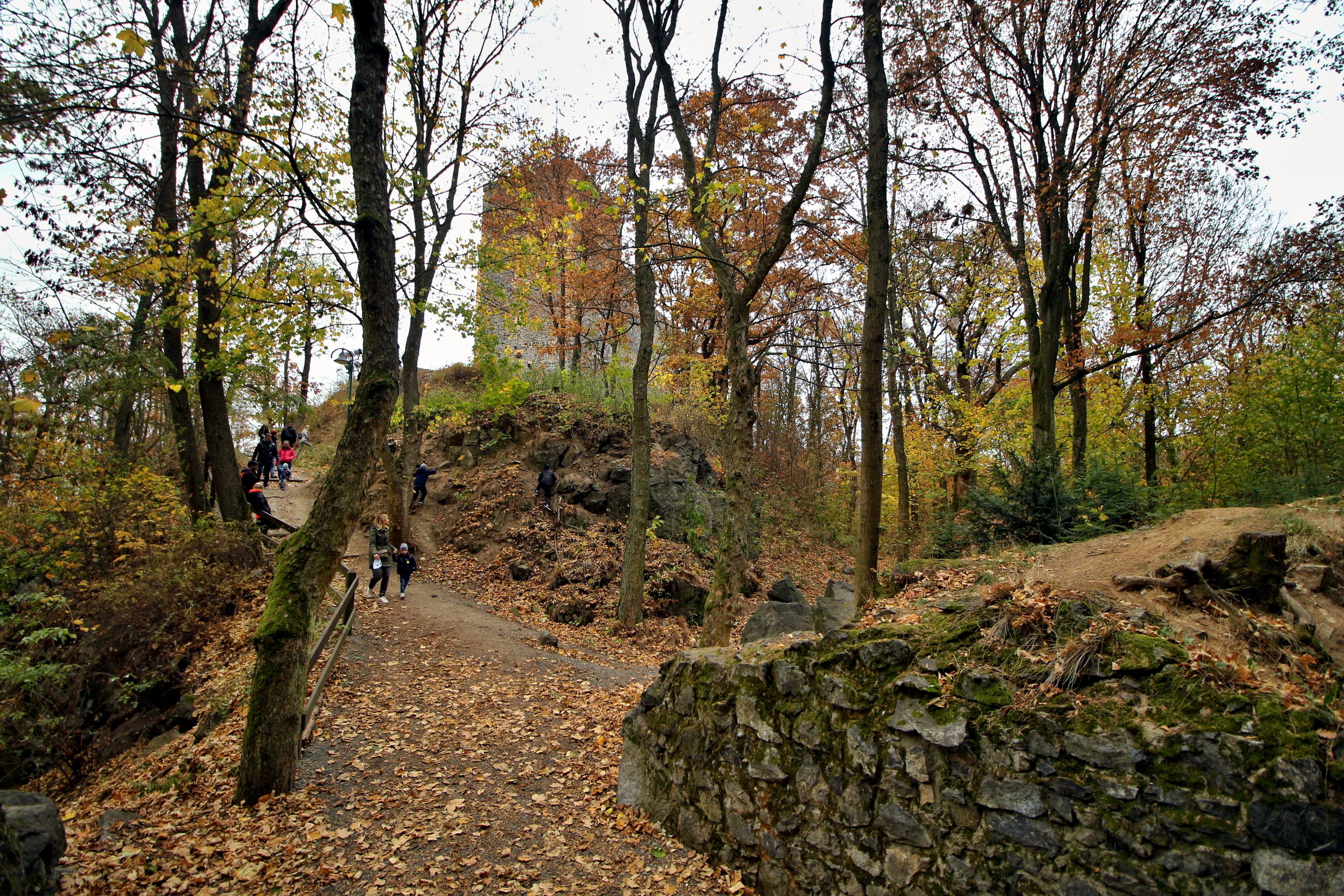 Hrad Radyně